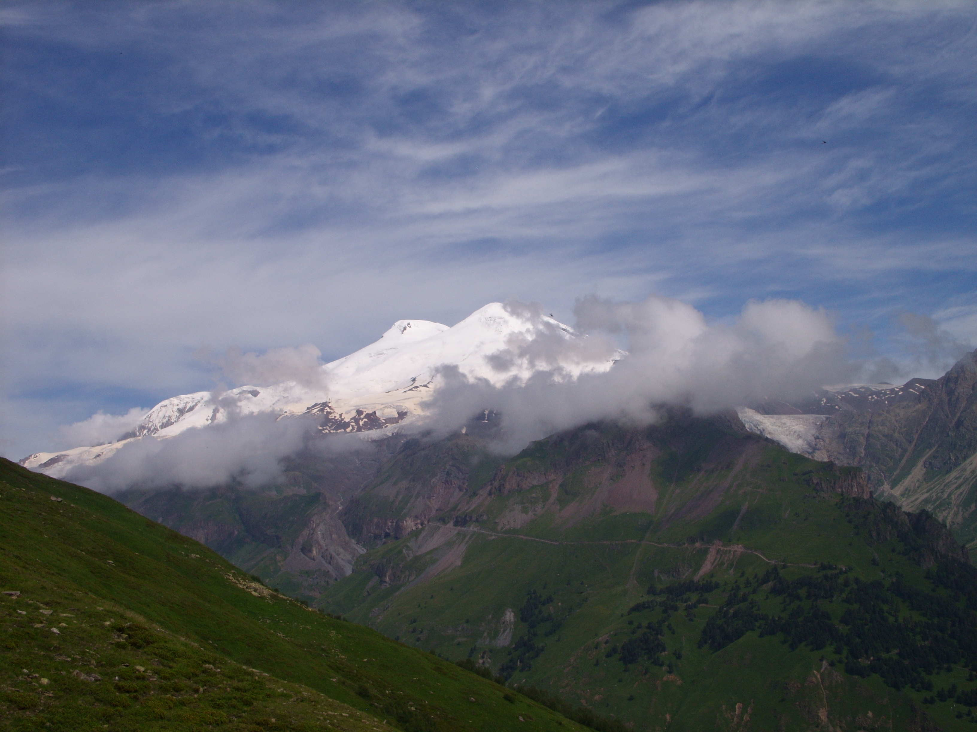 Снимки сделаны во время автобусной экскурсии из Железноводска, июль 2009 г.